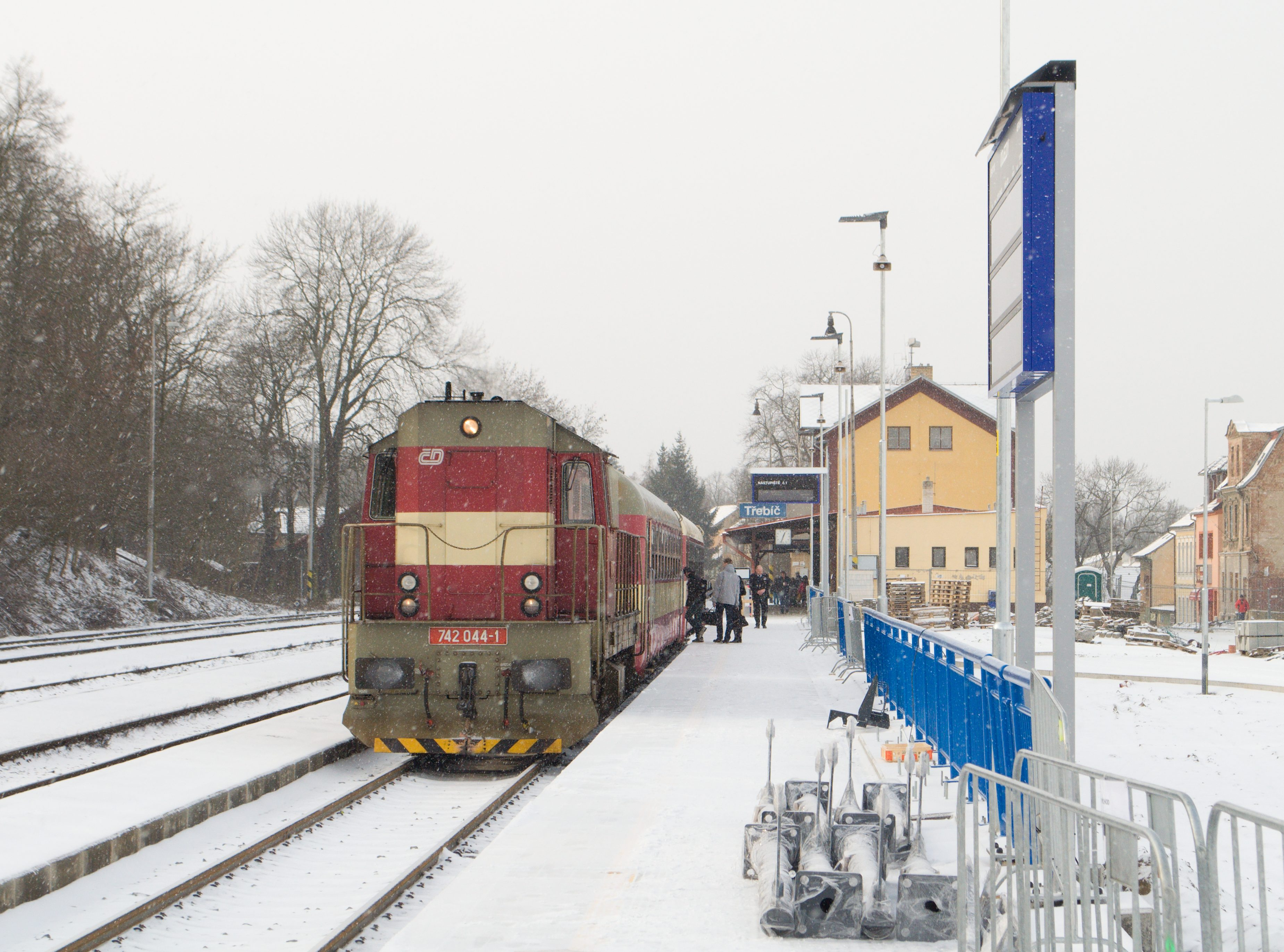 Nové nástupiště v Třebíči, mimořádně s lokomotivou 742.044 "Kocour"